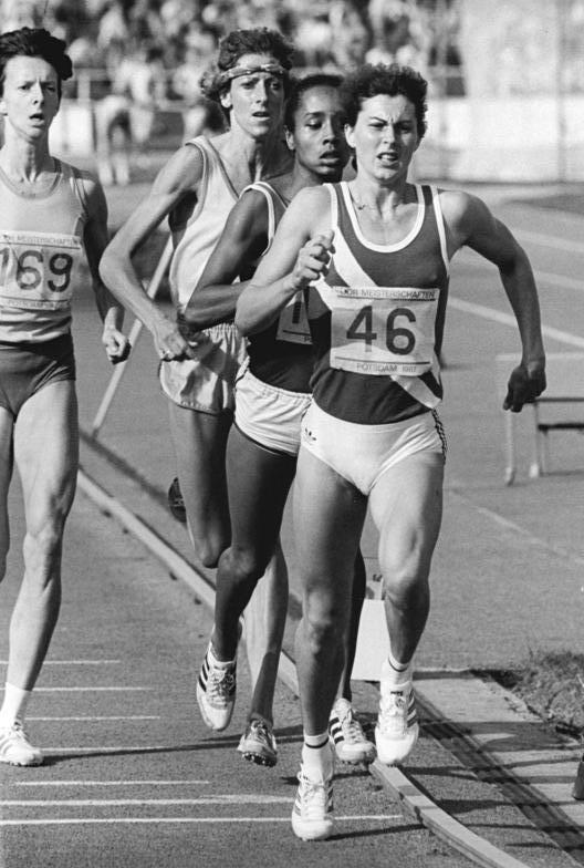 Hildegard Körner, Andrea Lange, Ulrike Bruns, Yvonne Grabner ADN-ZB Koard 24.8.87-A-Potsdam: 38. DDR-Leichtathletik-Meisterschaften - Die Erfurterin Hildegard Körner (vorn, Nr. 46) siegte am 22.8. in Jahresweltbestleistung von 4:00,06 Minuten vor Andrea Lange (l.), Ulrike Bruns (2.v.l.; beide ASK Vorwärts Potsdam) und Yvonne Grabner (2.v.r.; SC Karl-Marx-Stadt).